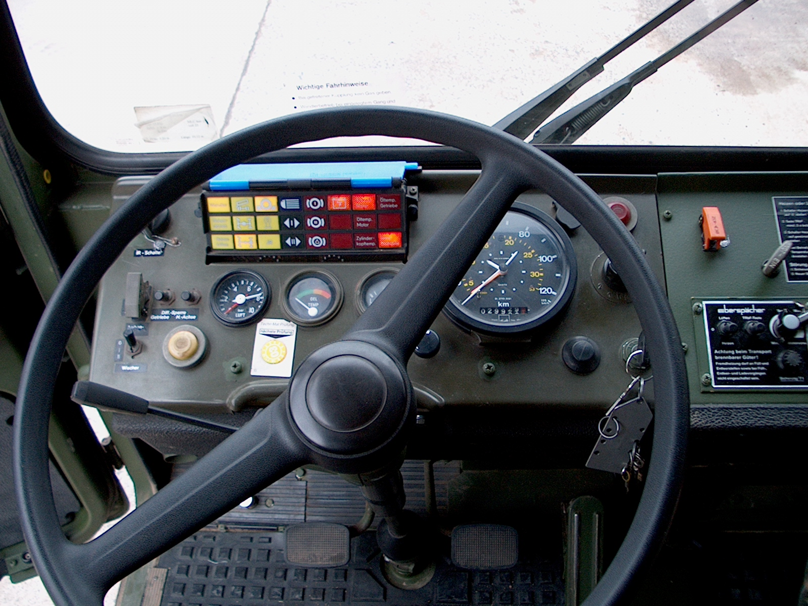 MAN 10to gl Cockpit